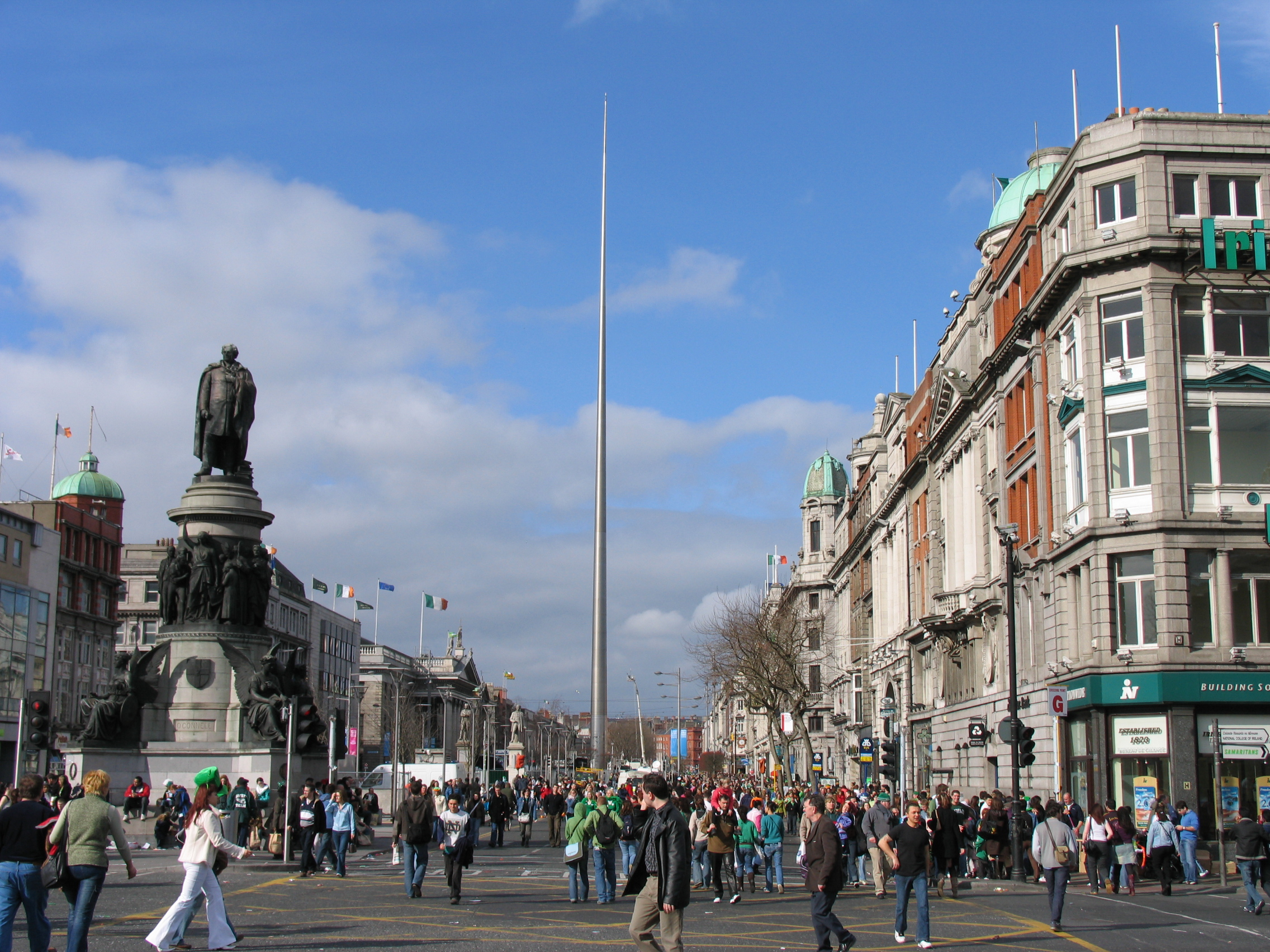 Dublin O'Connell street2